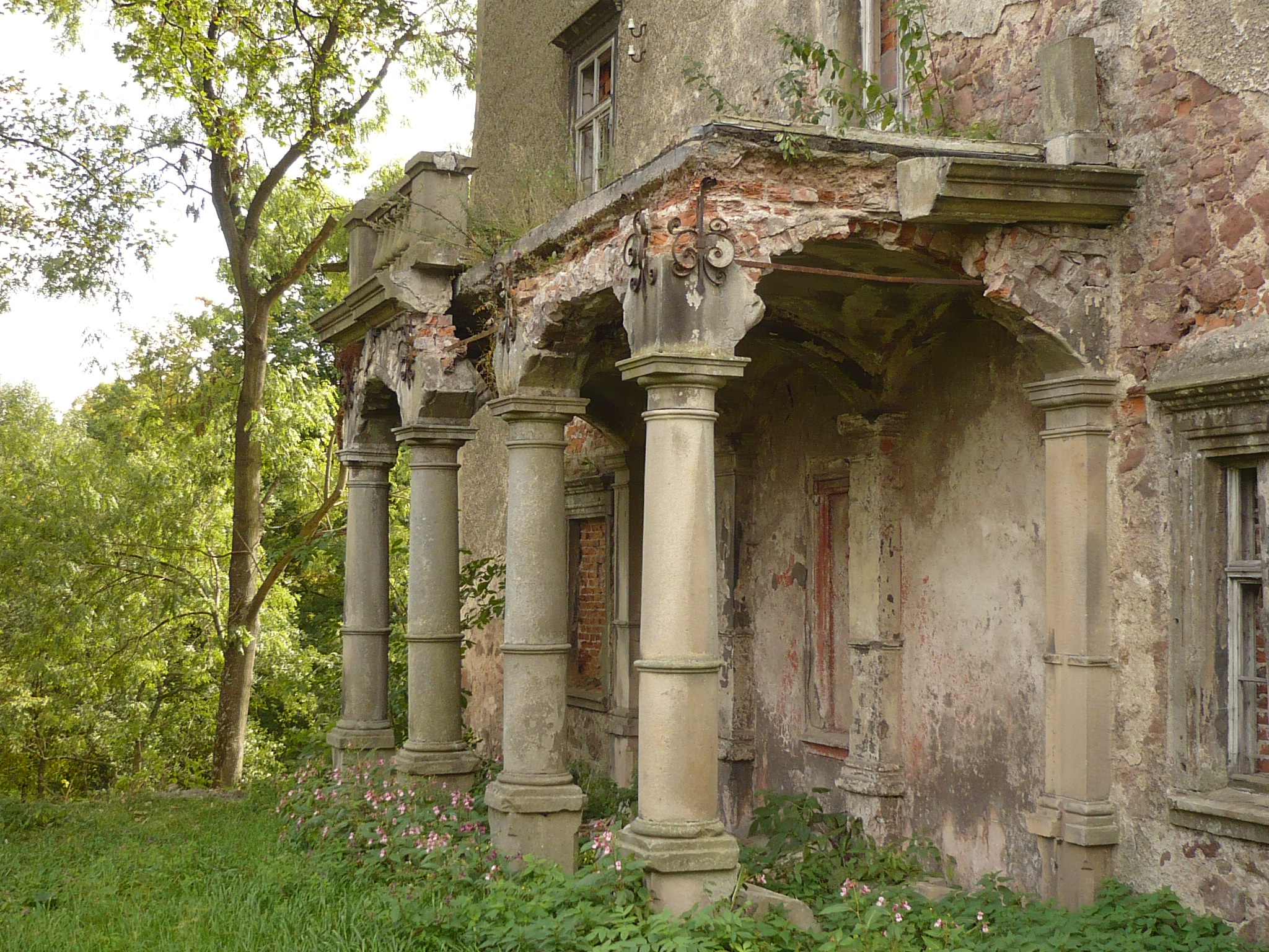 Sarny. Portyk